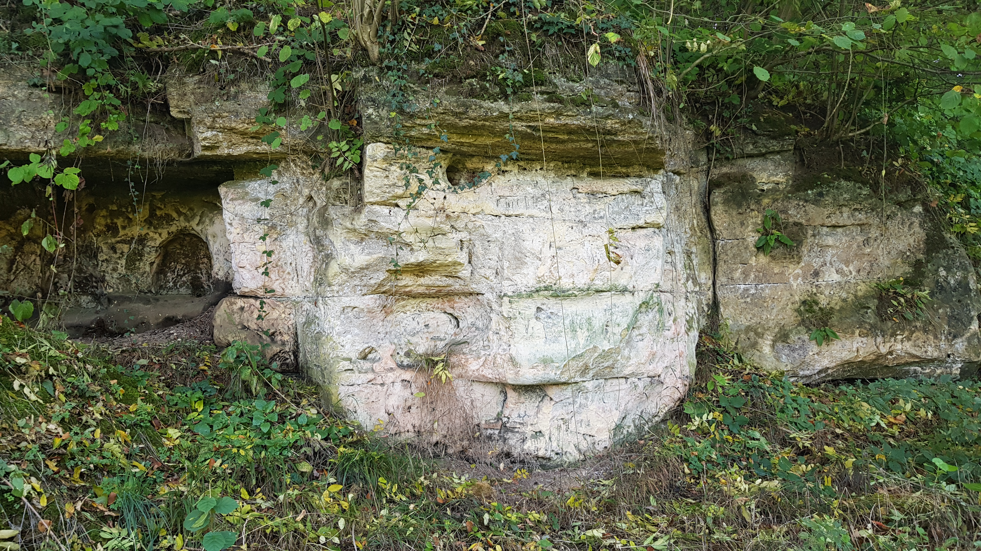 Groeve achter Lemmekenskoel, Sibbe, Nederland